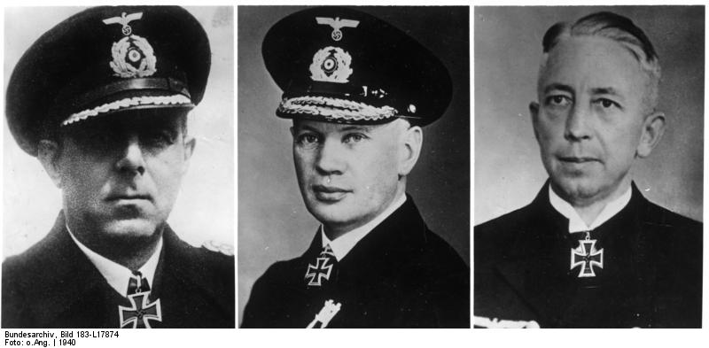 Heye, Kummetz, Thiele (v.l.n.r.) Scherl: Für entscheidende Taten in Norwegen ausgezeichnet. In besonderer Anerkennung ihrer Verdienste bei der Eroberung Norwegens hat der Führer und Oberste Befehlshaber der Wehrmacht auf Vorschlag des Oberbefehlshabers der Kriegsmarine, Großadmiral Dr. h.c. Raeder, das Ritterkreuz des Eisernen Kreuzes verliehen an: Konteradmiral Kummetz, Führer einer Kampfgruppe (Mitte), Kapitän zur See Thiele, Kommandant eines Kreuzers (rechts) und Kapitän zur See Heye, Kommandant eines Kreuzers (links). Scherl Bilderdienst - OKW 29.1.41 [Herausgabedatum] "Fr" OKW Zentralbild: 29.1.1941 II. Weltkrieg 1939-45 Die bei dem am 9.4.1940 begonnenen Überfall auf Norwegen beteiligten Marineoffiziere Konteradmiral Kummetz, Führer einer Kampfgruppe (mitte), Kapitän zur See Thiele, Kommandant eines Kreuzers (rechts) und Kapitän zur See Heye, Kommandant eines Kreuzers (links), mit dem Ritterkreuz ausgezeichnet. Abgebildete Personen: Kummetz, Oskar: Admiral, Ritterkreuz (RK), Marine, Deutschland Heye, Hellmuth Guido Alexander: Vizeadmiral, Ritterkreuz (RK), Marine, Bundestagsabgeordneter (MdB), CDU, Bundesrepublik Deutschland (PND 124338054) Thiele, August: Kapitän zur See, Ritterkreuz (RK), Marine, Deutschland